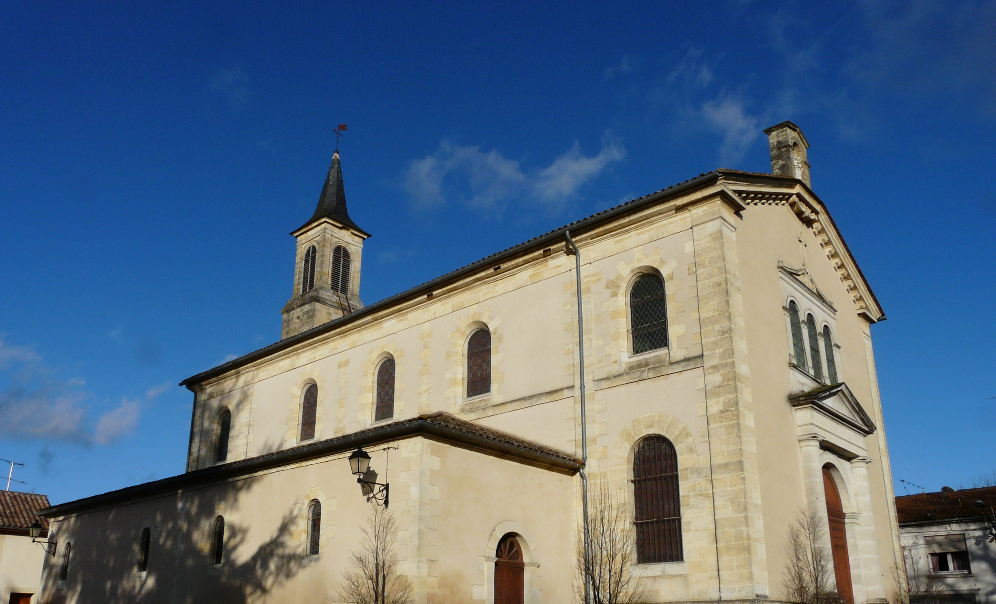 L'église Notre-Dame de l'Assomption, Montpon-Ménestérol, Dordogne, France